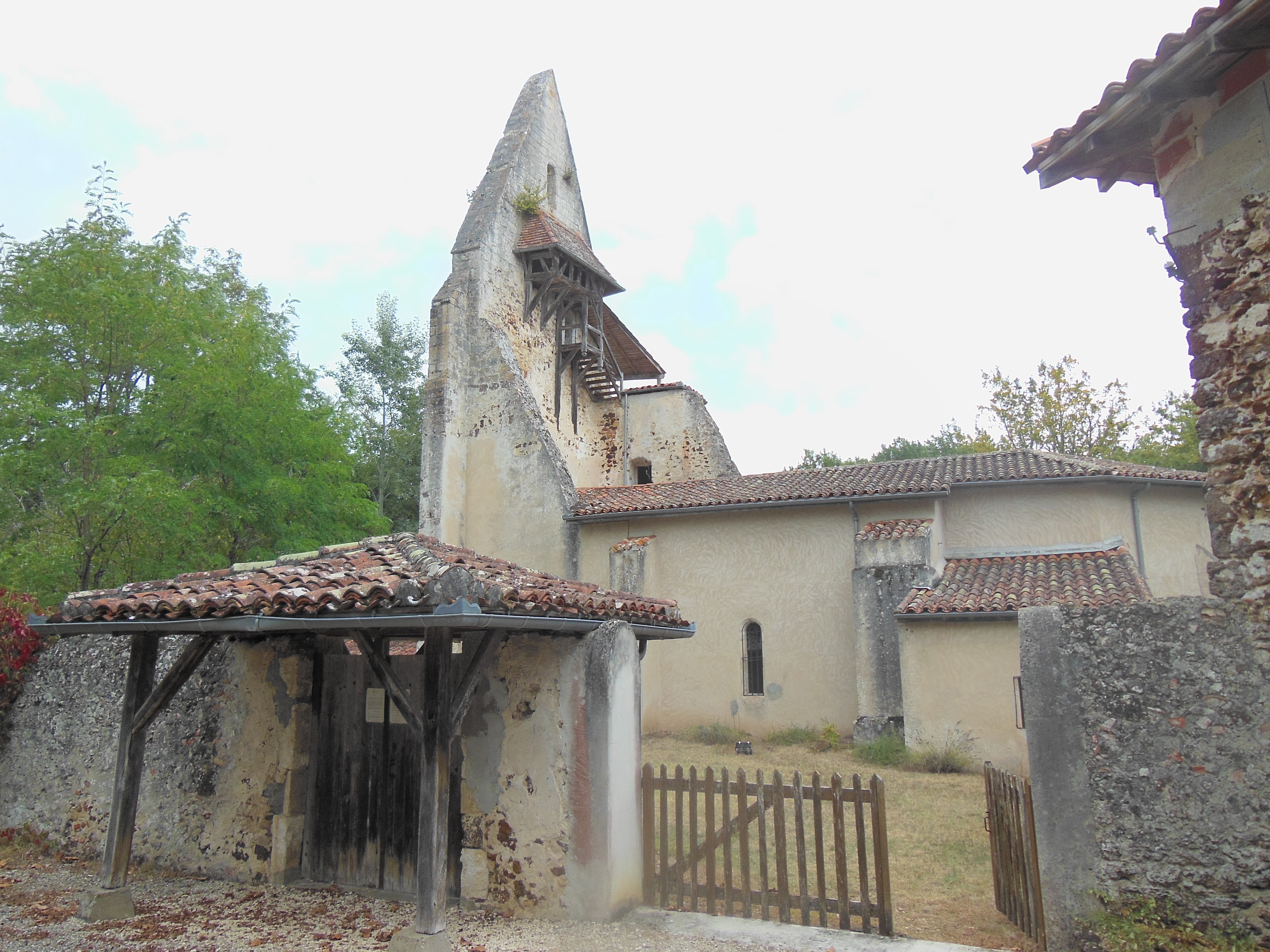 Église Saint-Georges de Lussolle, dans le département français des Landes